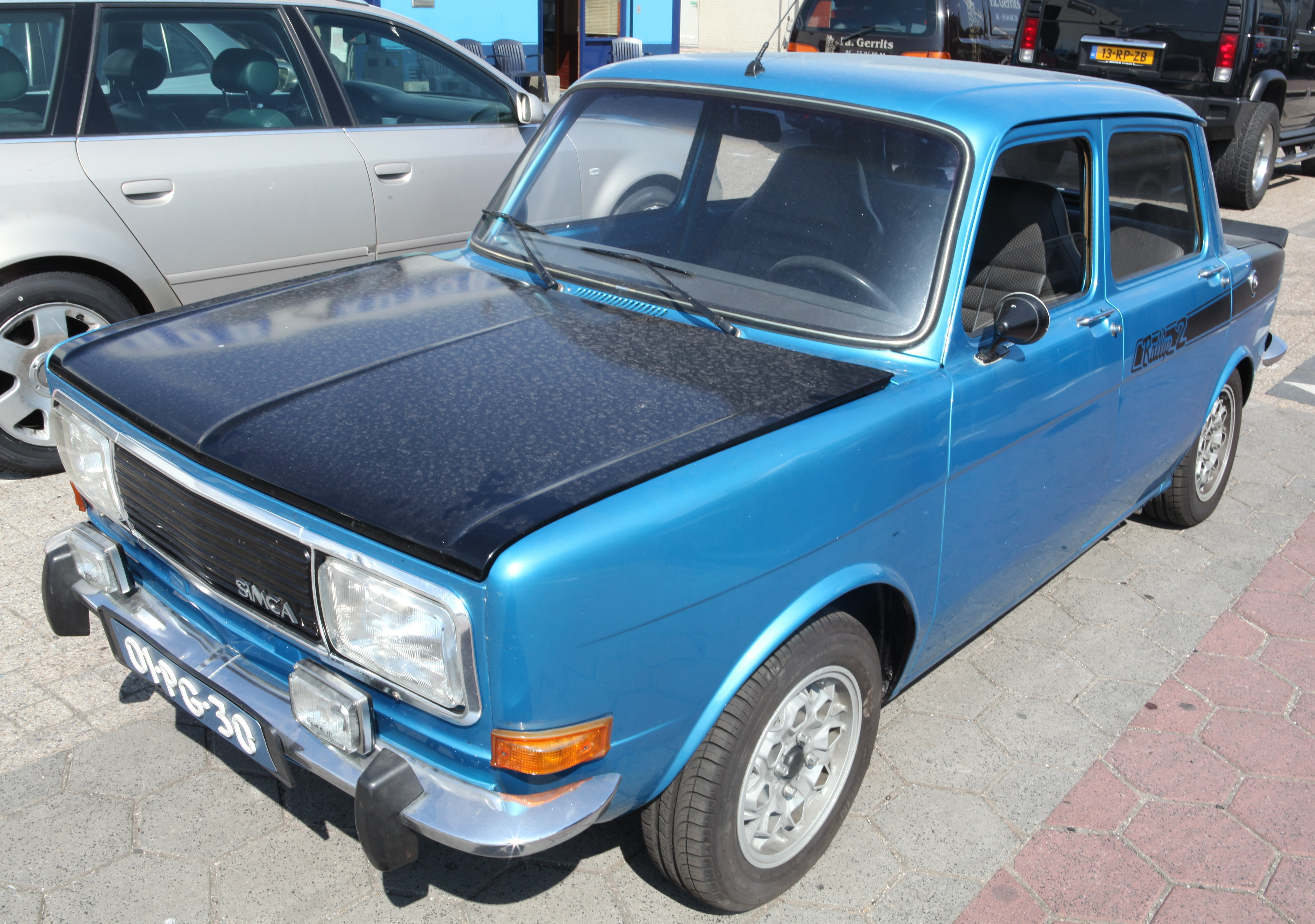 Simca 1000 Rallye 2